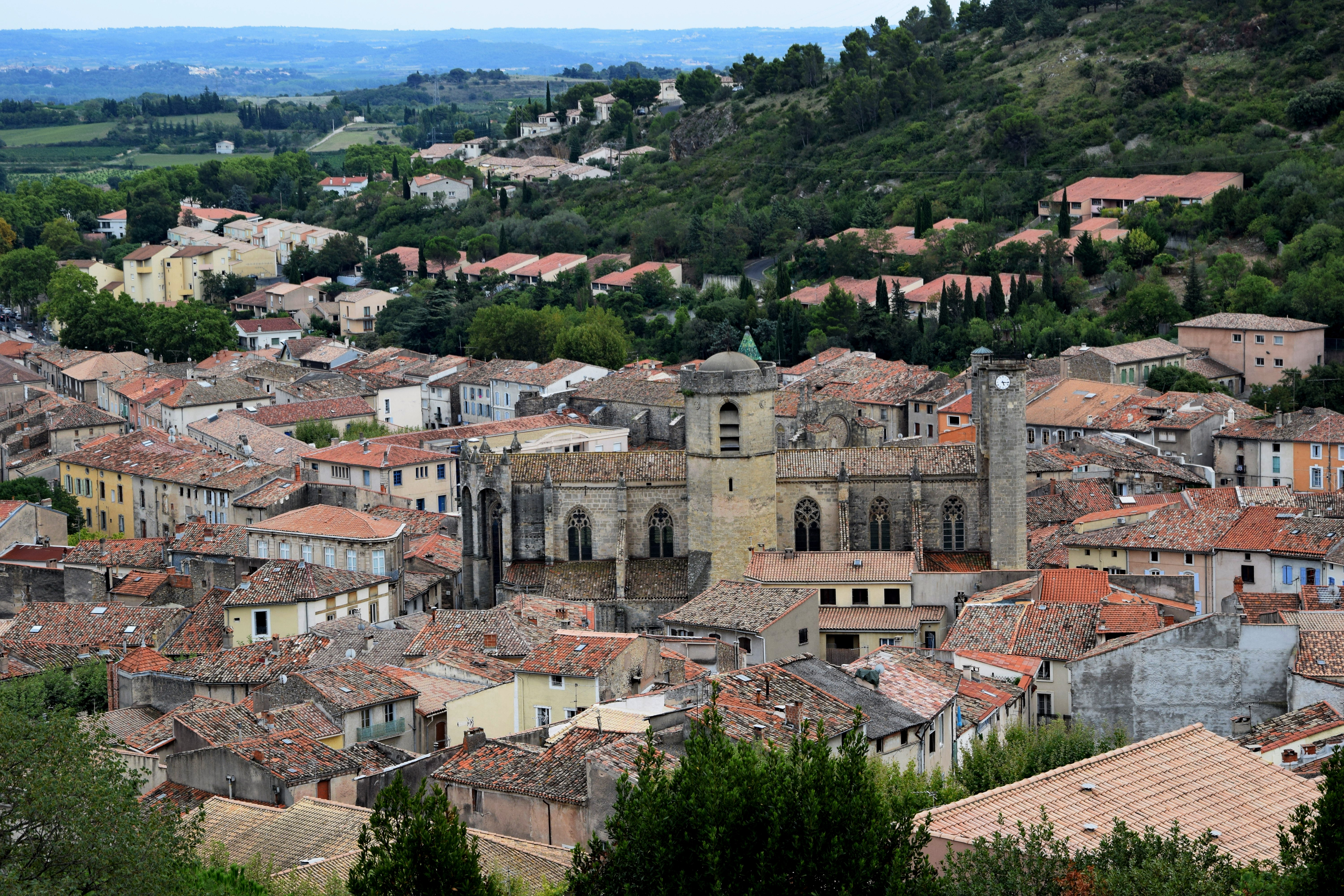 Collégiale Saint-Paul de Clermont-l'Hérault